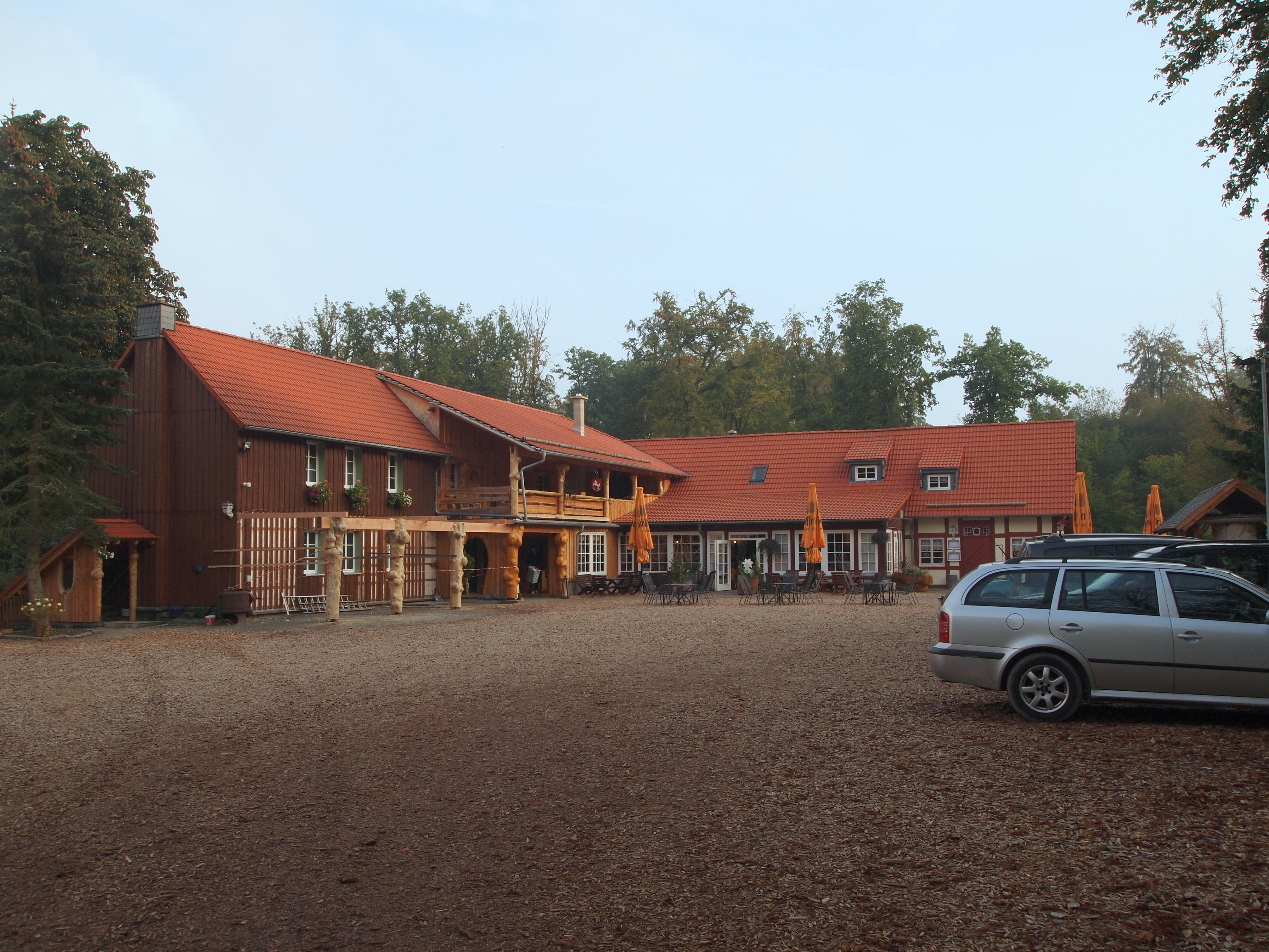 "Zum Alten Forsthaus Todtenrode" (Gasthof und Pension); nahe Altenbrak, Landkreis Harz, Sachsen-Anhalt